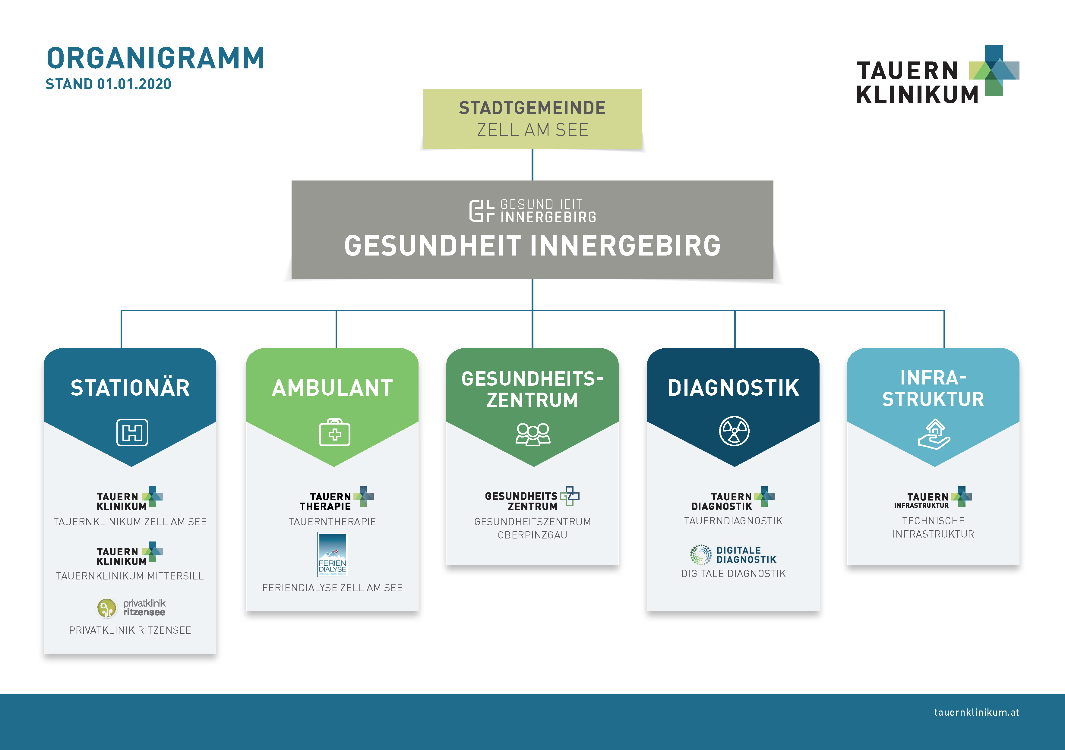 Organigram GI 2020